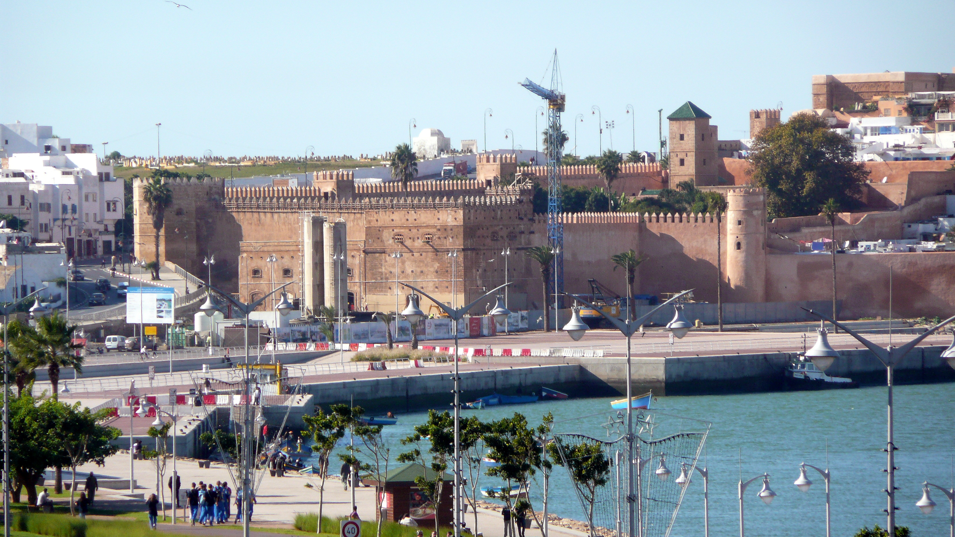 Enceinte de la Kasbah des Oudaias côté de l'Oued Bou Regreg (Rabat, Maroc)